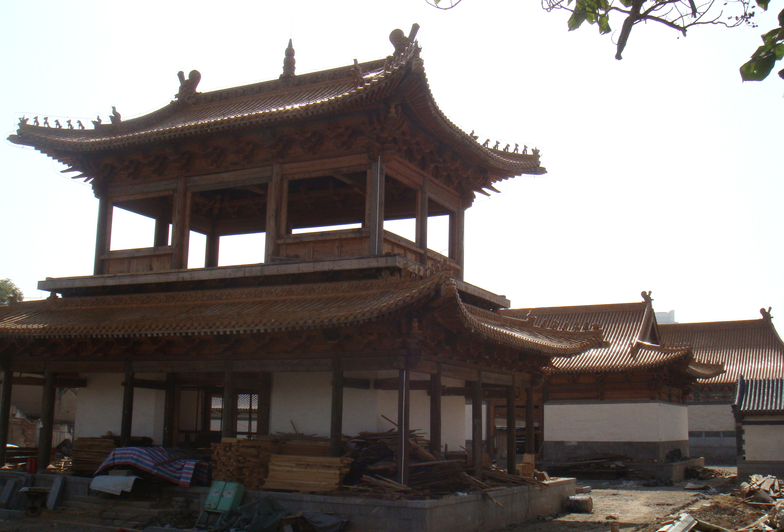 济南府学文庙，图为由北向南望新建的尊经阁。